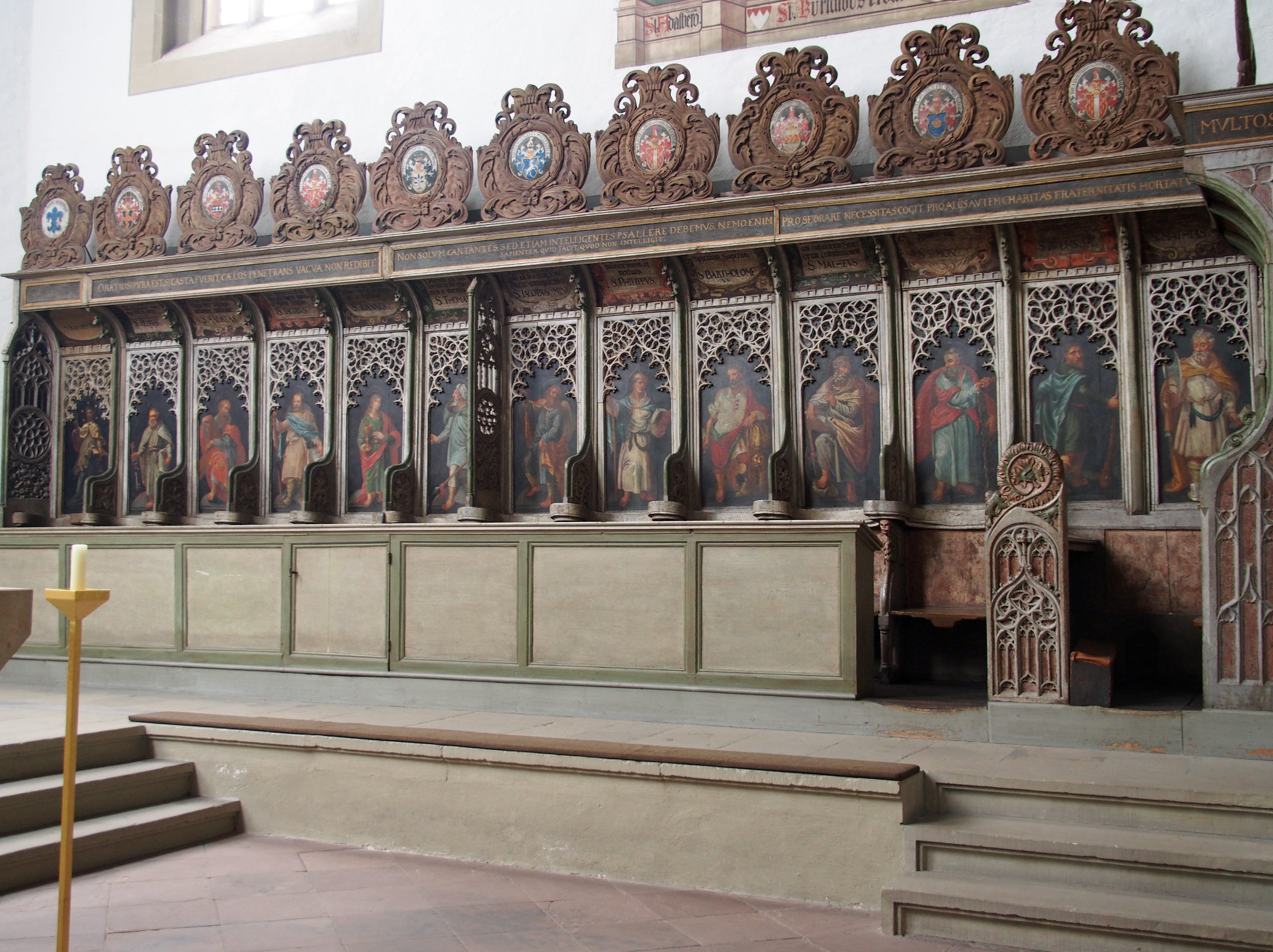 Chor in der Kirche St. Burkard (Würzburg)